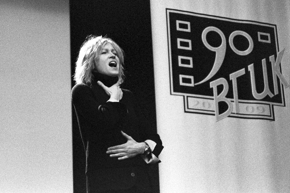 Ingeborga Dapkunaite